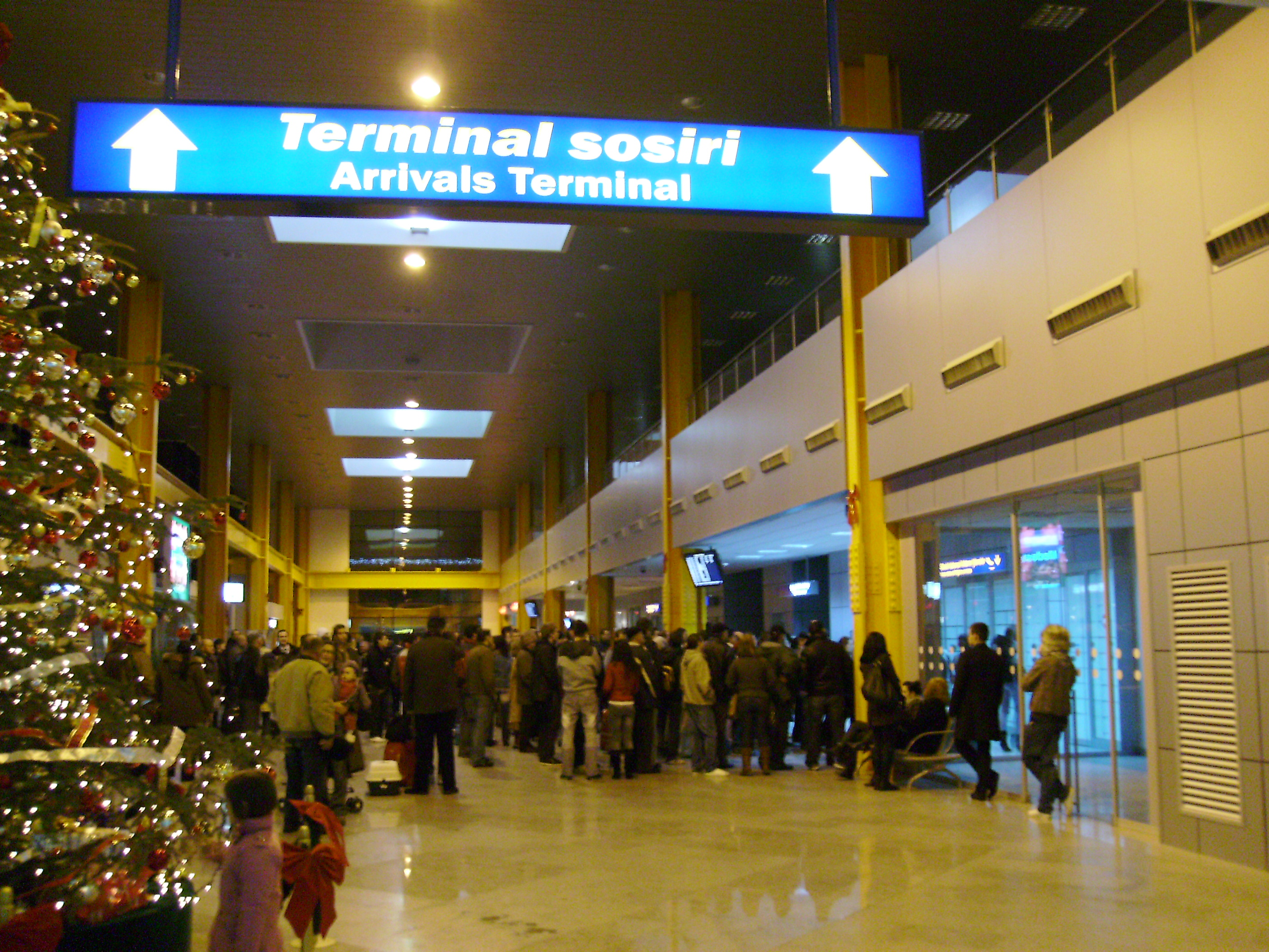 Cluj-Napoca International Airport, Romania